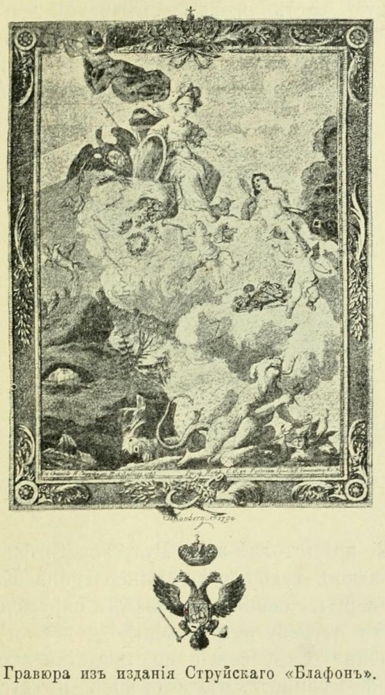 Гравюра опубл. в 1791 г. [как]: Изъ стихотв. Н. П. Струйскаго, П. А. Зябловъ 1783. Рис. съ плаф. Е. О[зёров] въ Рузаевкѣ. Грав. въ Санктпетерб. 1789 Нижеслед. виньетка гравирована Шенбергом.